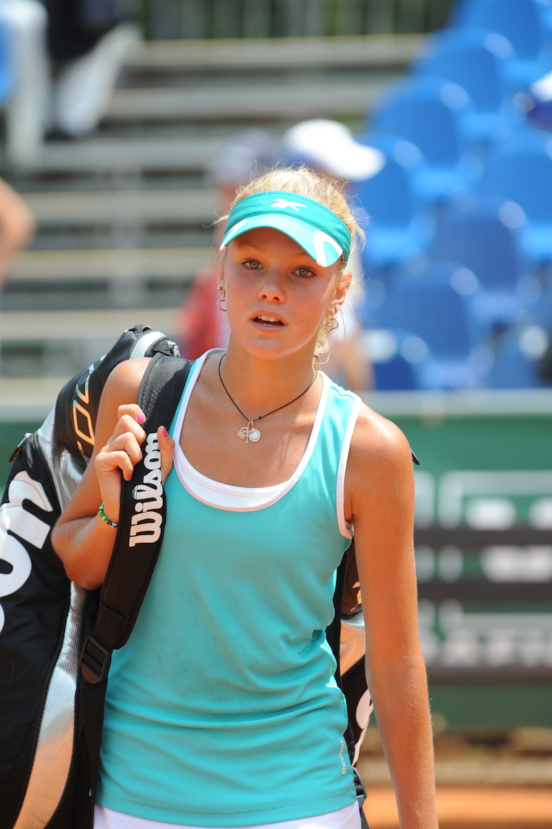 Sofija Žuk - Photo by Francesco Panunzio